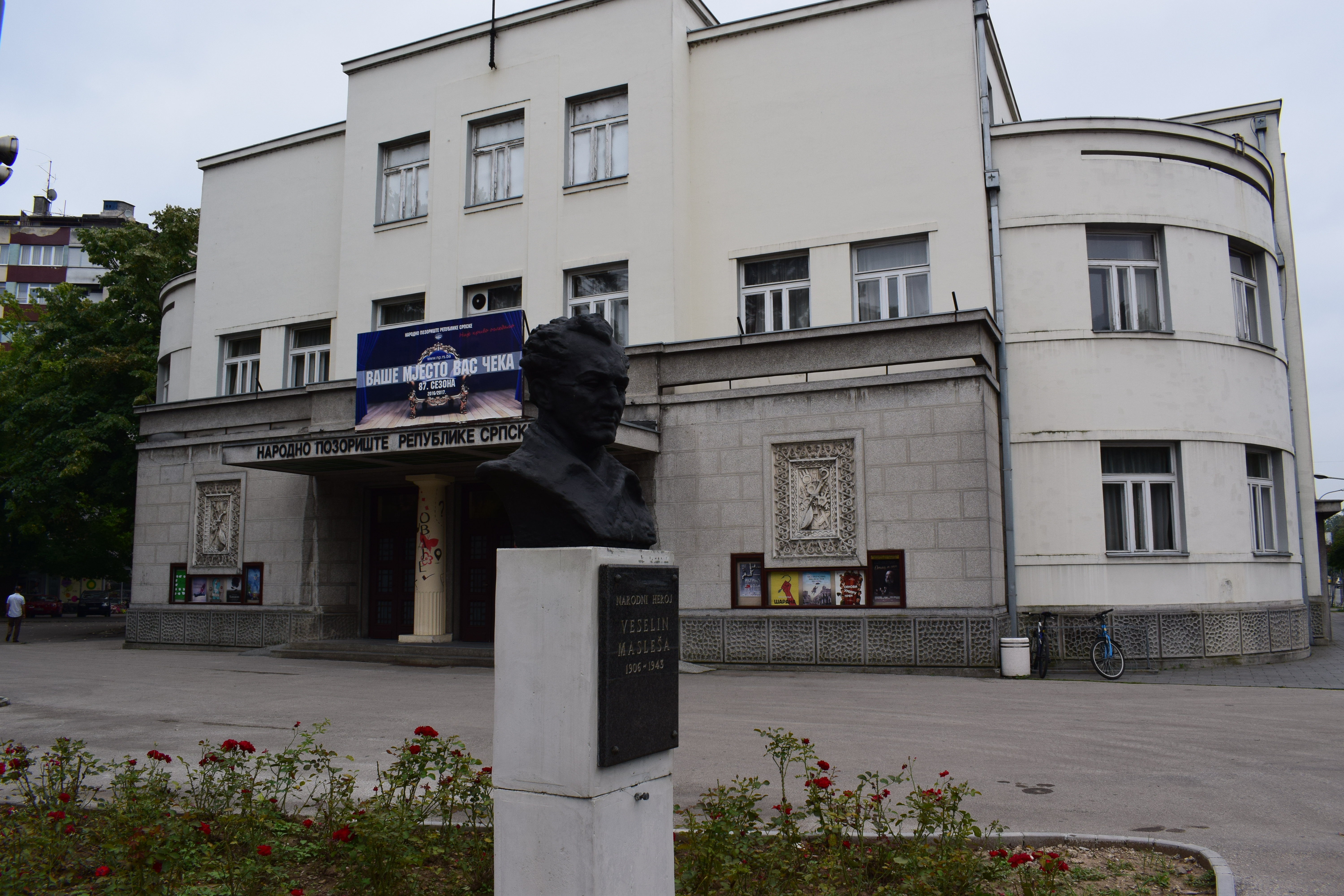 Народно позориште Републике Српске у Бањој Луци основано је 2. септембра 1930. године као „Народно позориште Врбаске бановине“ и од тада је важан носилац развоја драмске умјетности. У периоду након Другог свјетског рата носило је назив „Народно позориште Босанске Крајине“. Објекат се налази на листи националних споменика Босне и Херцеговине.